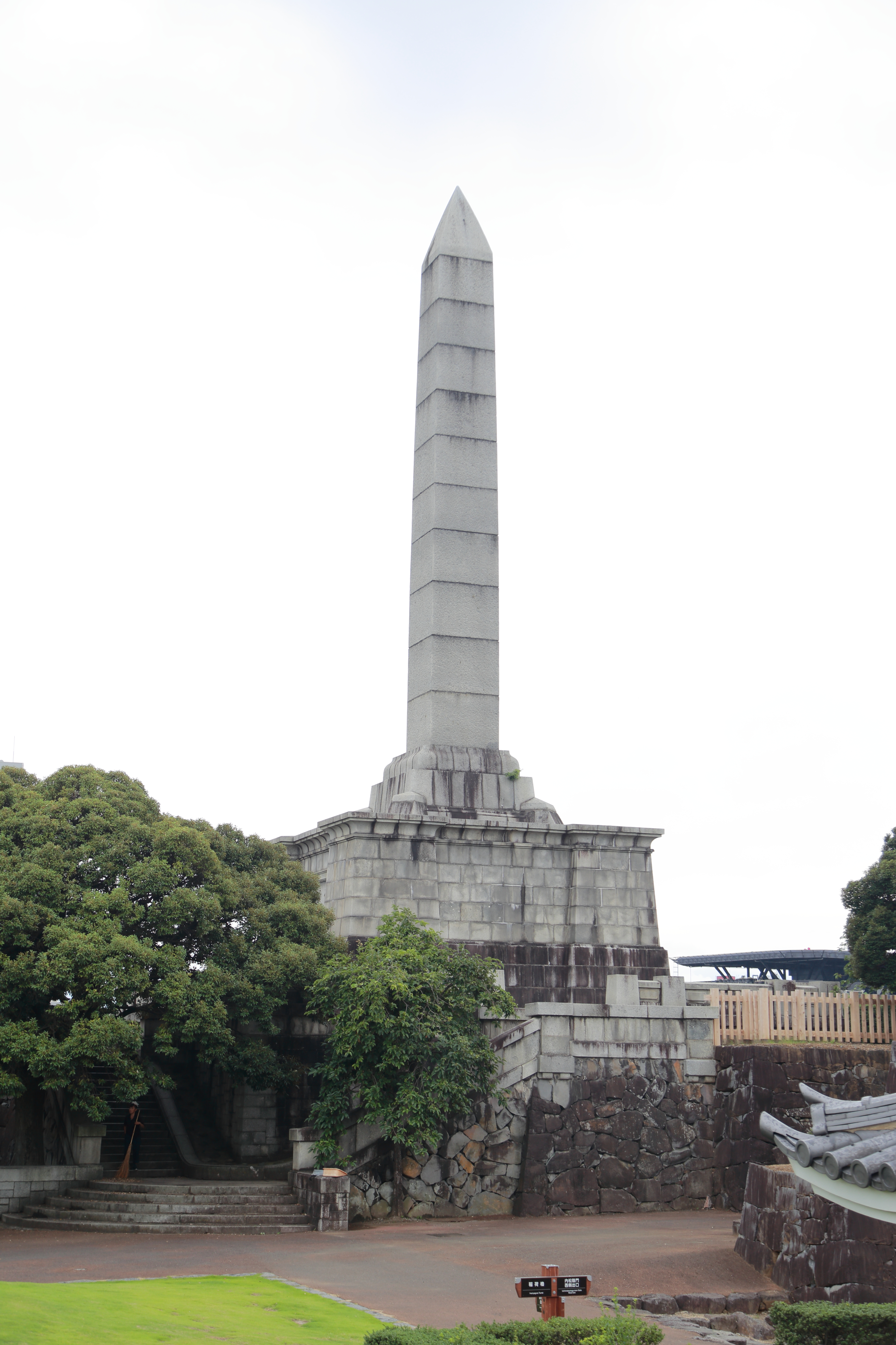 山梨県甲府市甲府城址の謝恩碑。